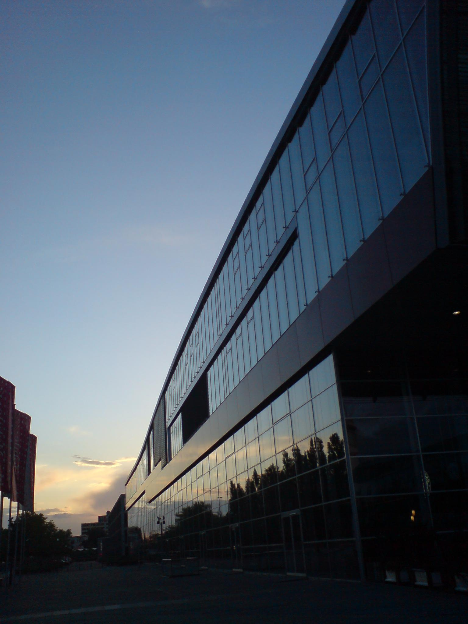 Headquarters of T-Mobile in Bonn